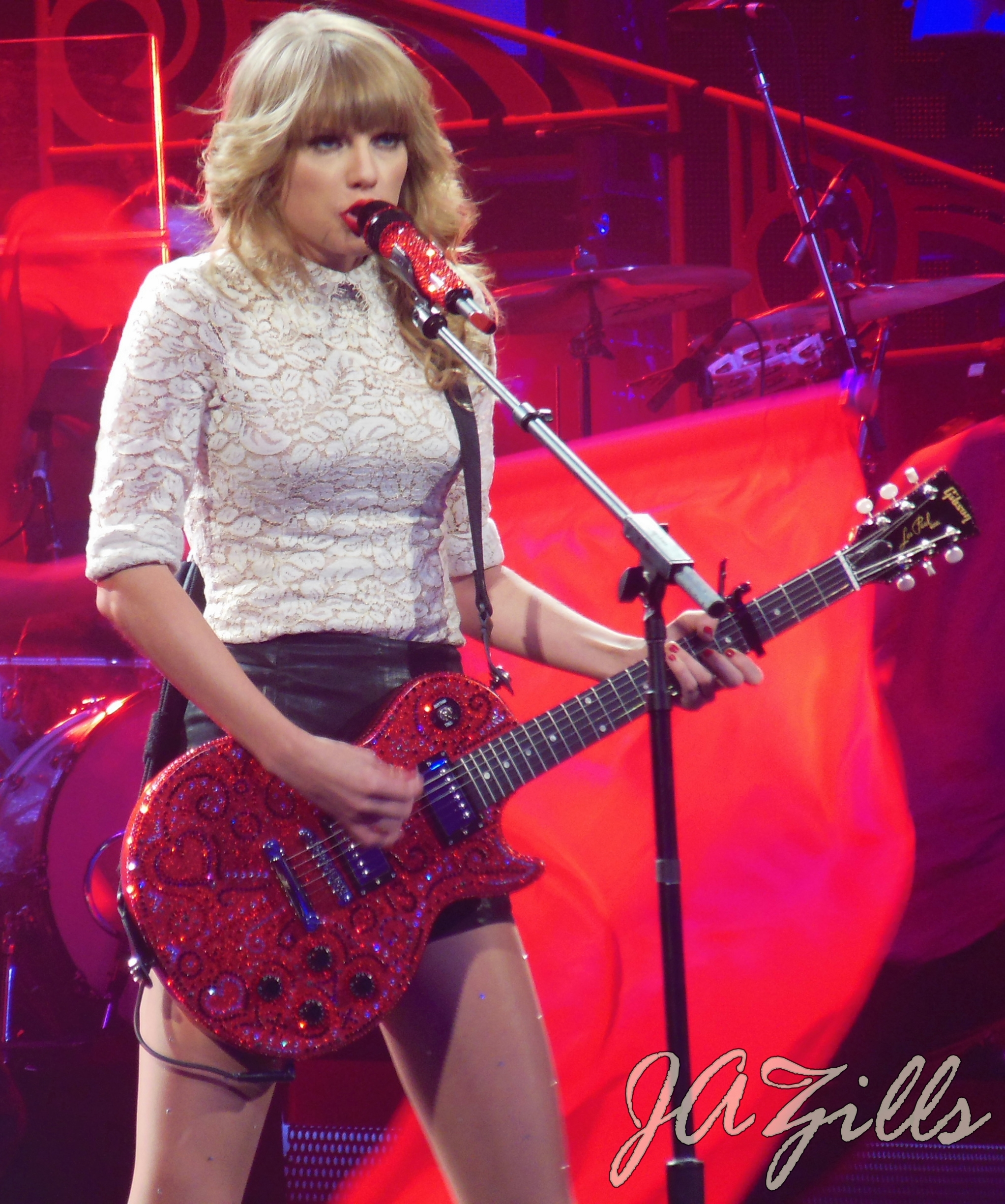 St. Louis, MO